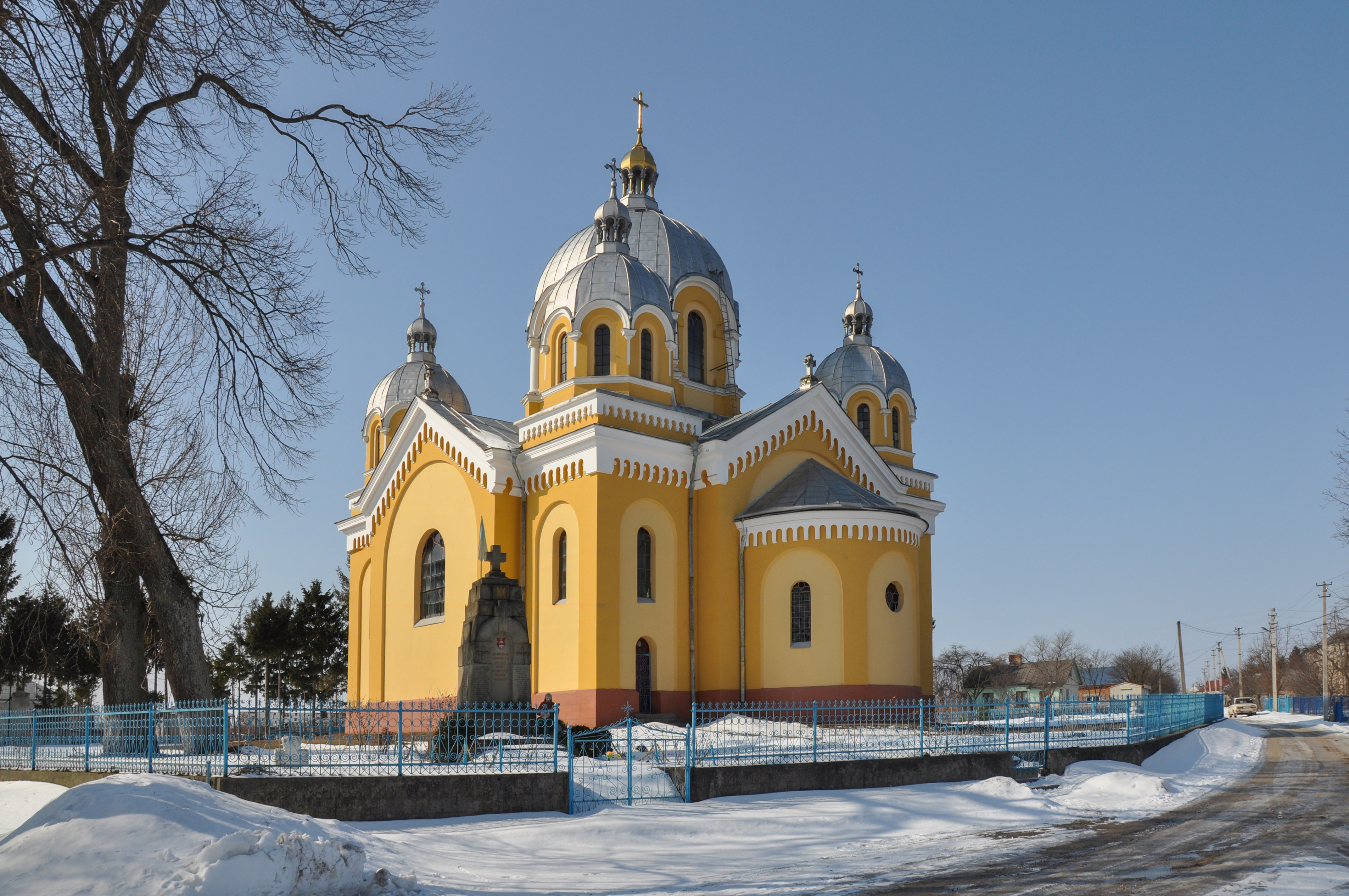 Церква Преображення Господнього (мур.), Токи